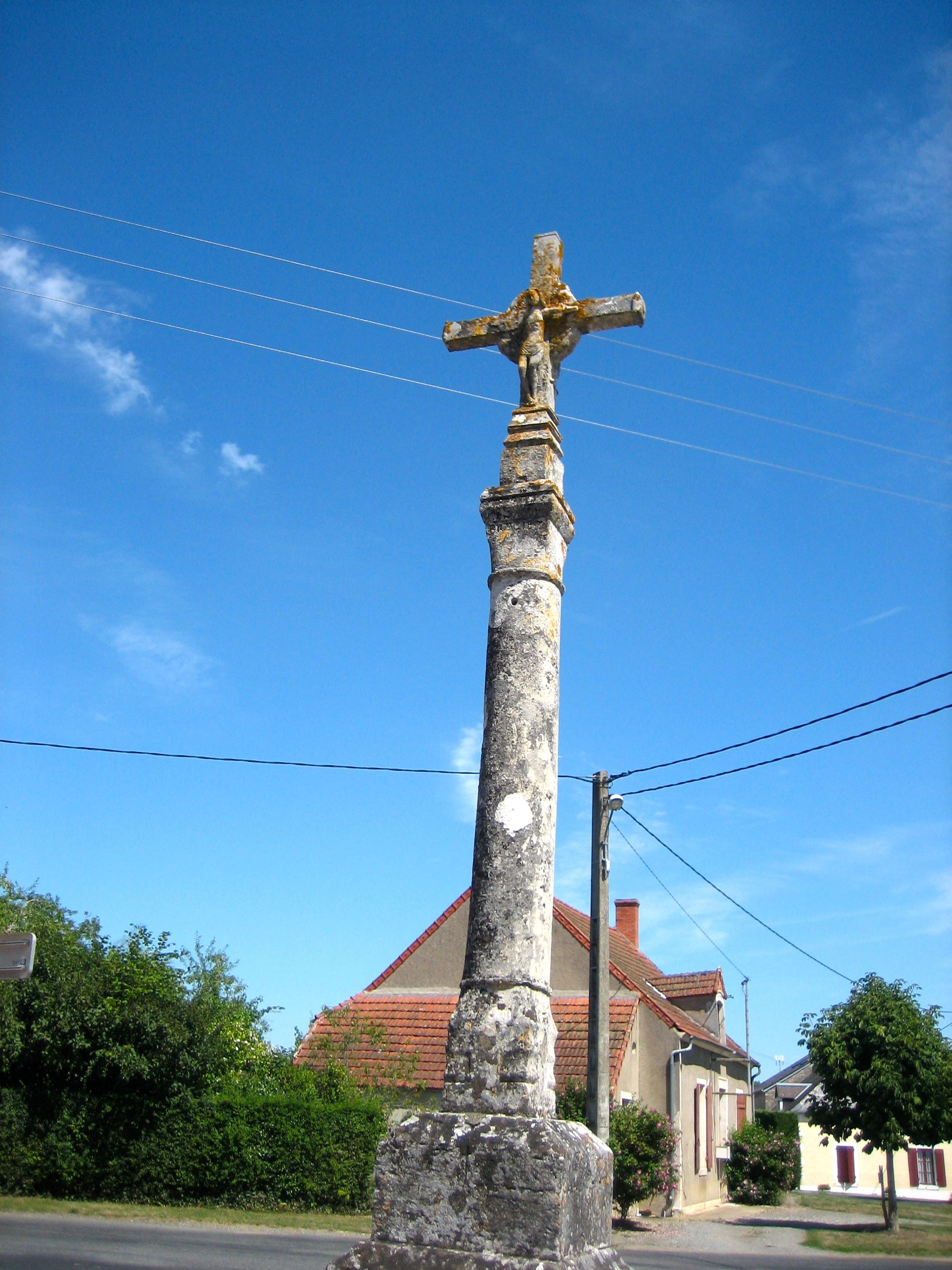 Croix de carrefour XVIe siècle, La Celle-Condé. Vue depuis la mairie